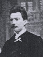 František Jaroslav Rypáček